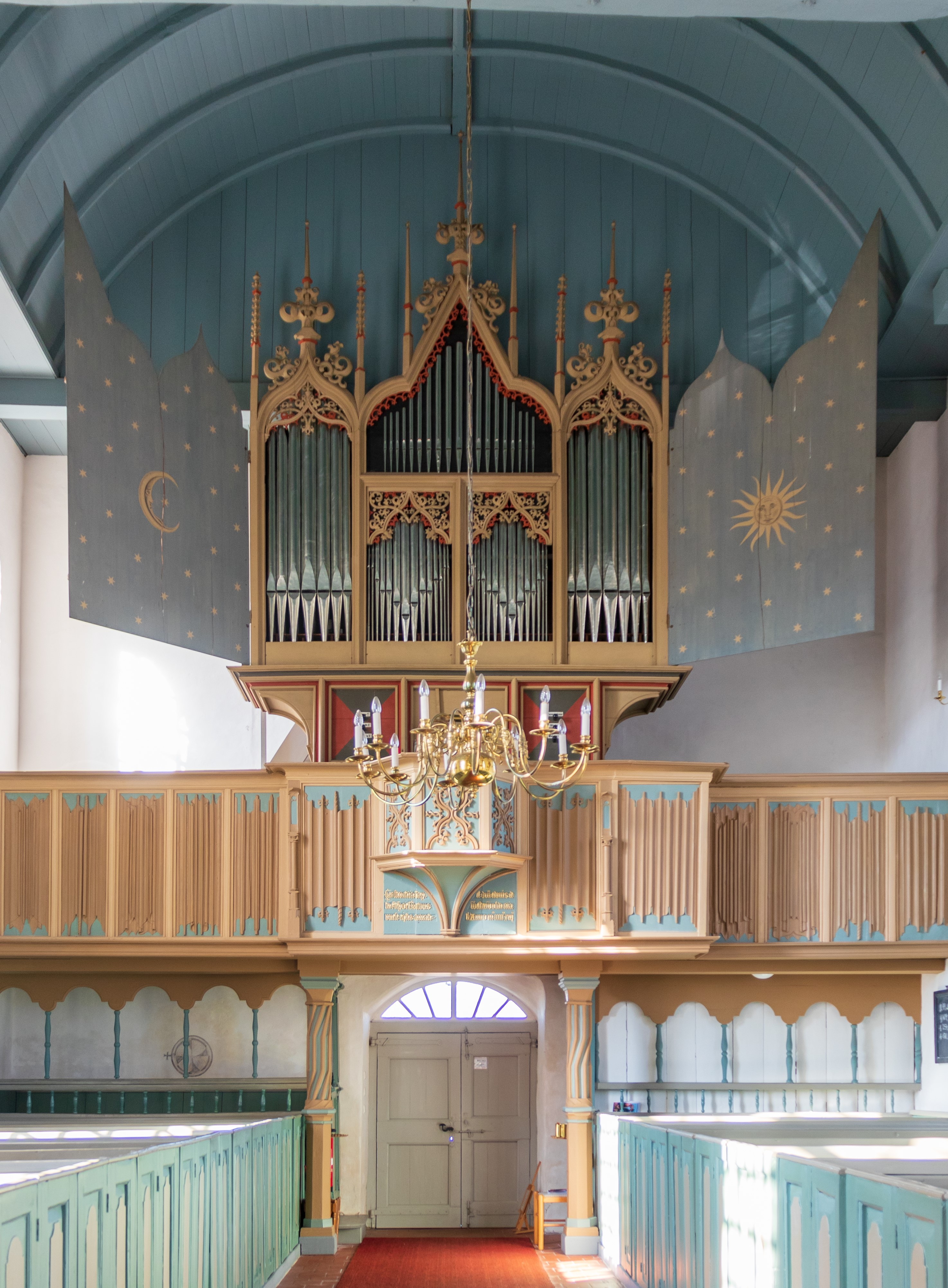 Orgel der Rysumer Kirche